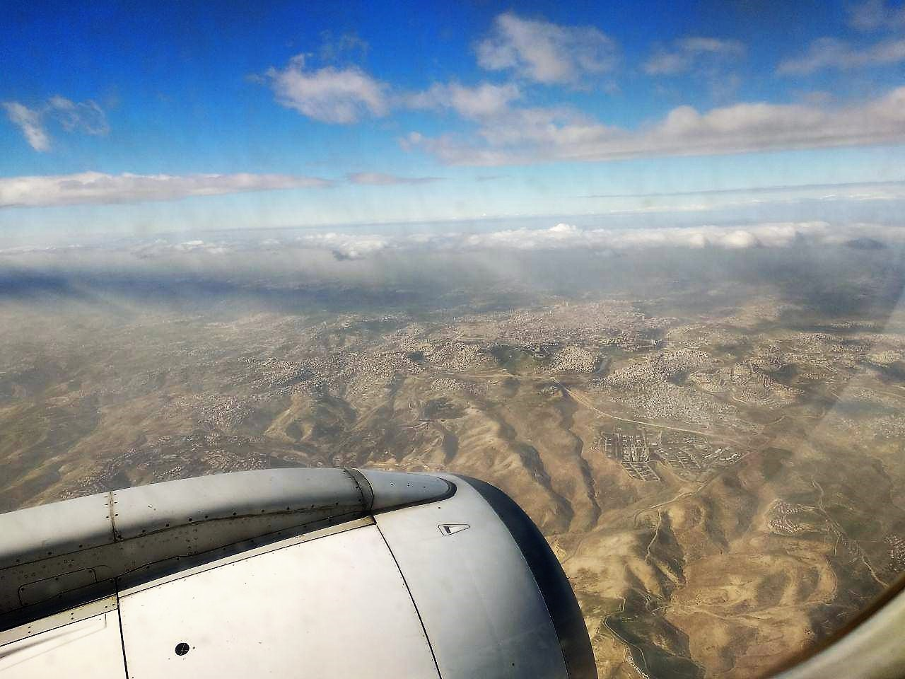 ענאתא (בחלק הקרוב אבו דאהוק ומימין וער אל ביק). בפינת התמונה הימנית התחתונה היישוב ענתות\עלמון.